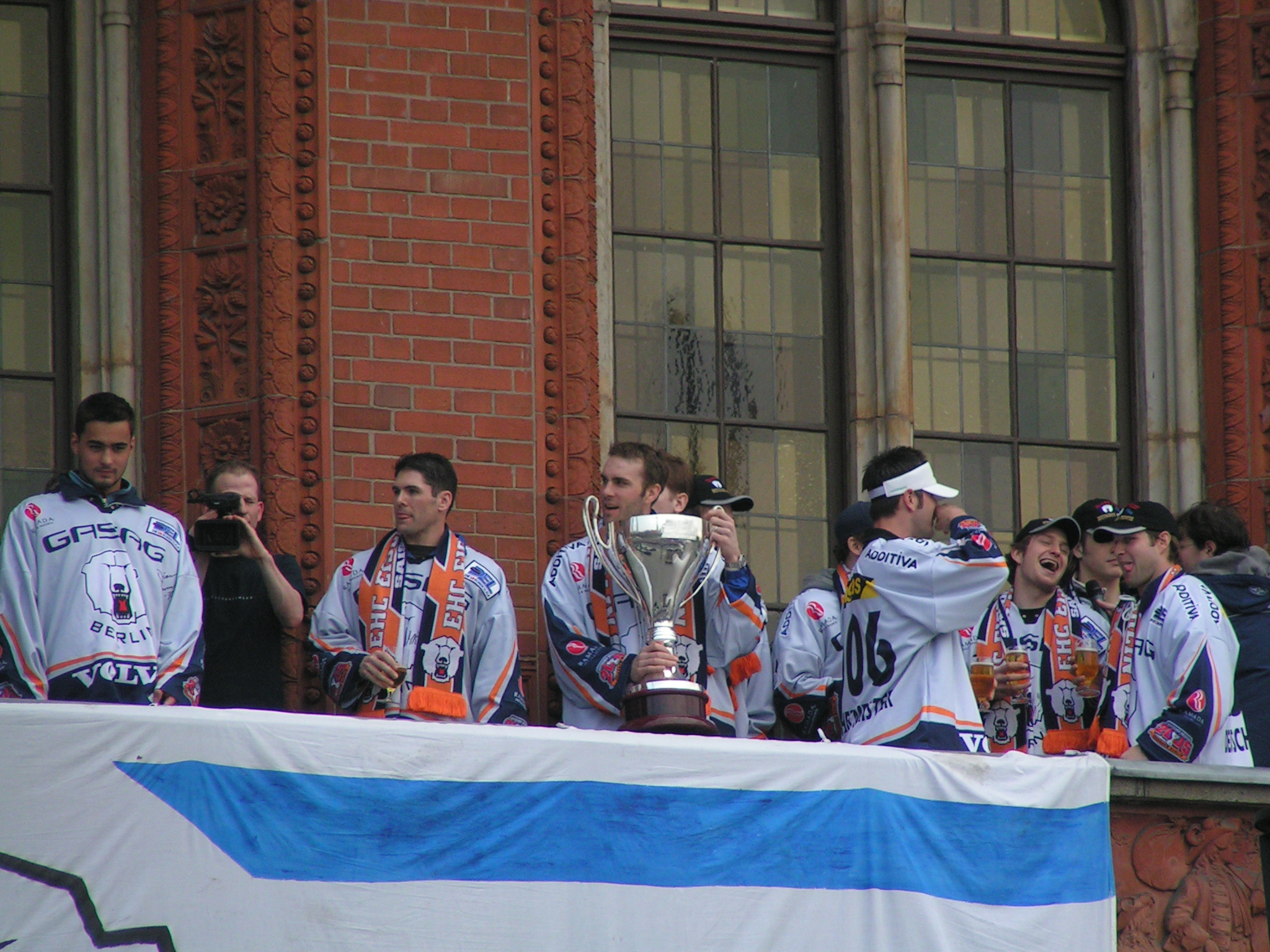 Empfang des Deutschen Eishockeymeisters der Herren 2006 Eisbären Berlin auf dem Balkon des Berliner Rathauses